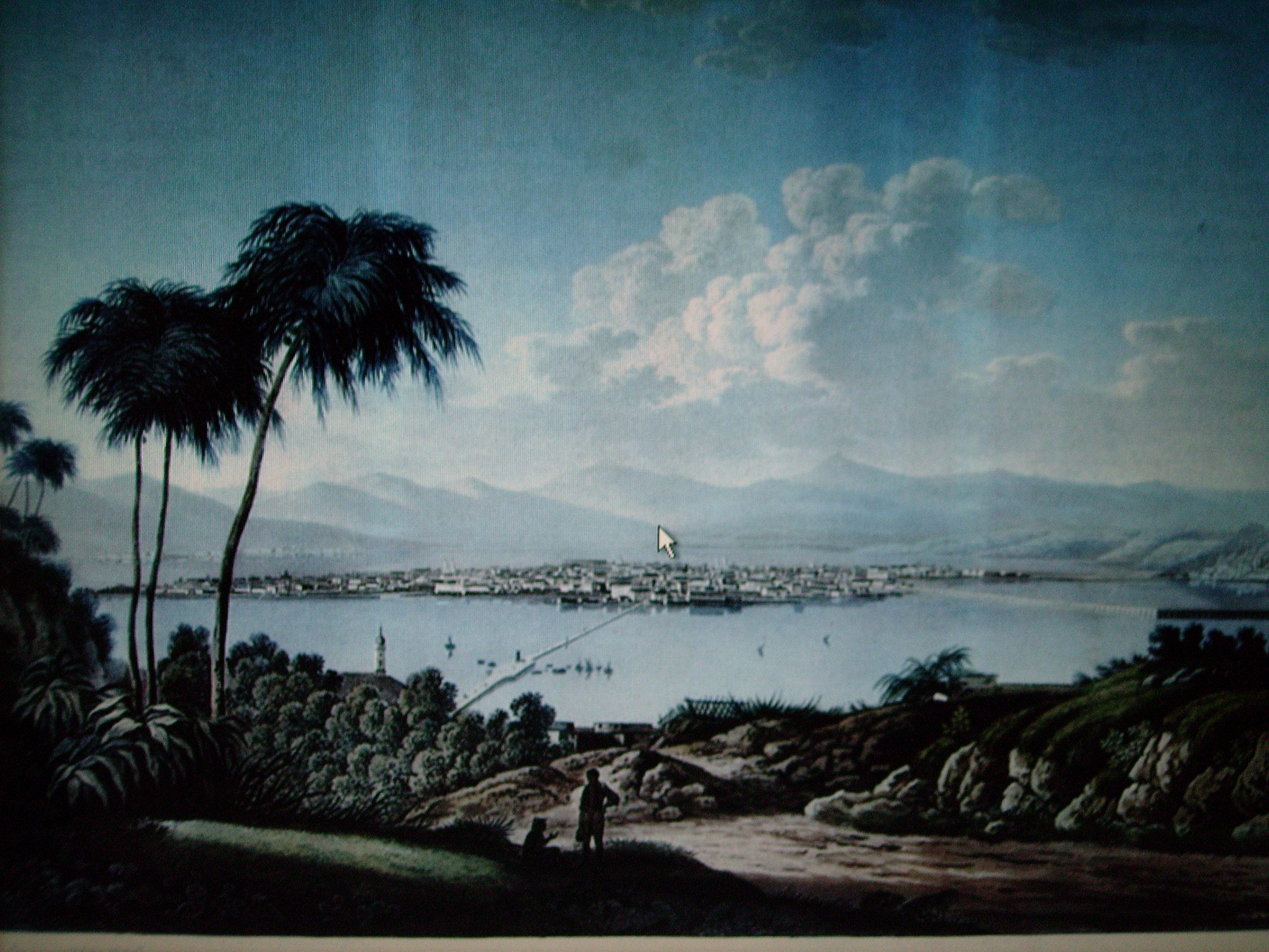 Vue de Mexico, 1834, Hegi (grabó), Noel (dibujó)